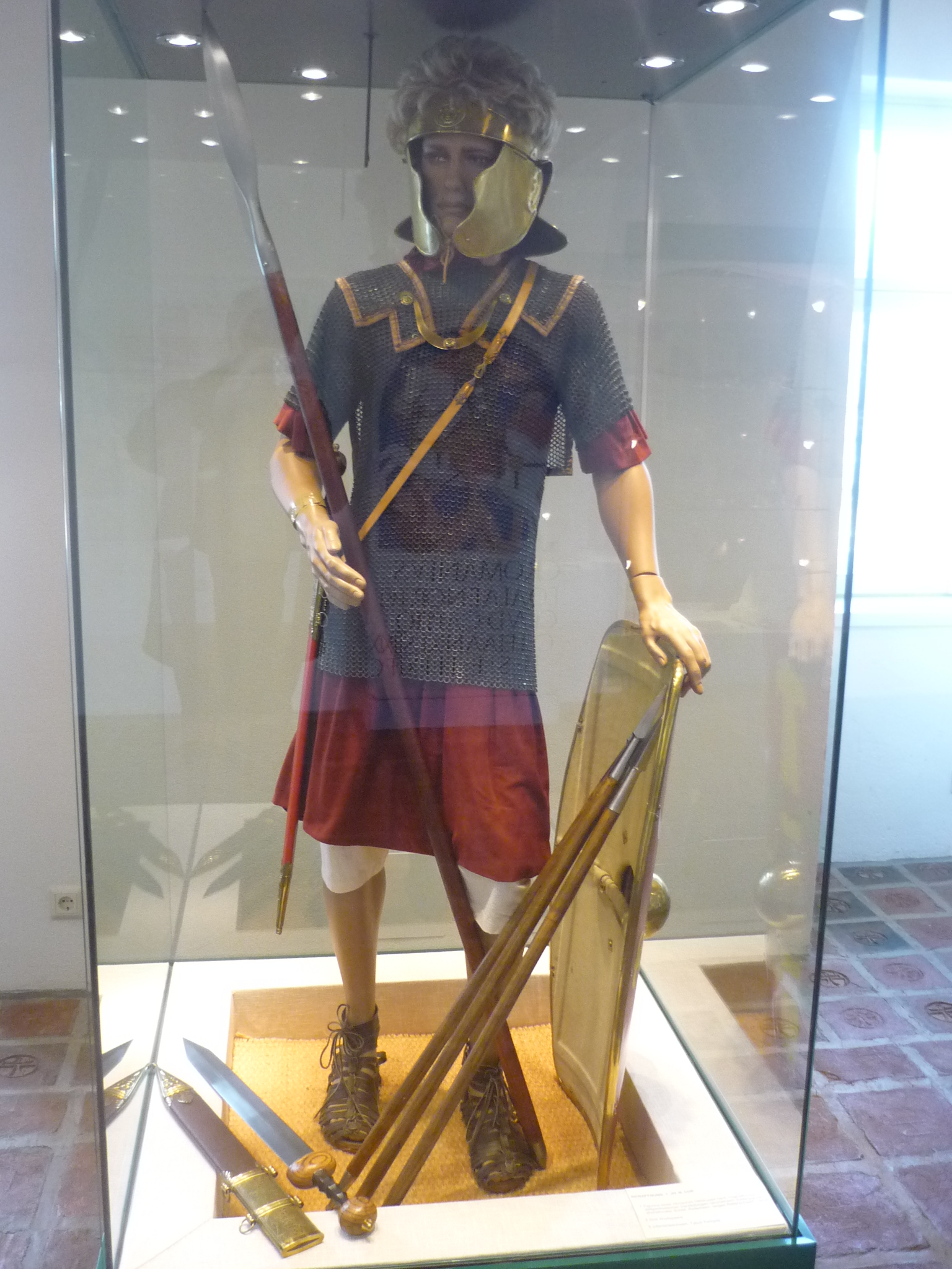 Figurine eines römischen Reiterhilfstrupps